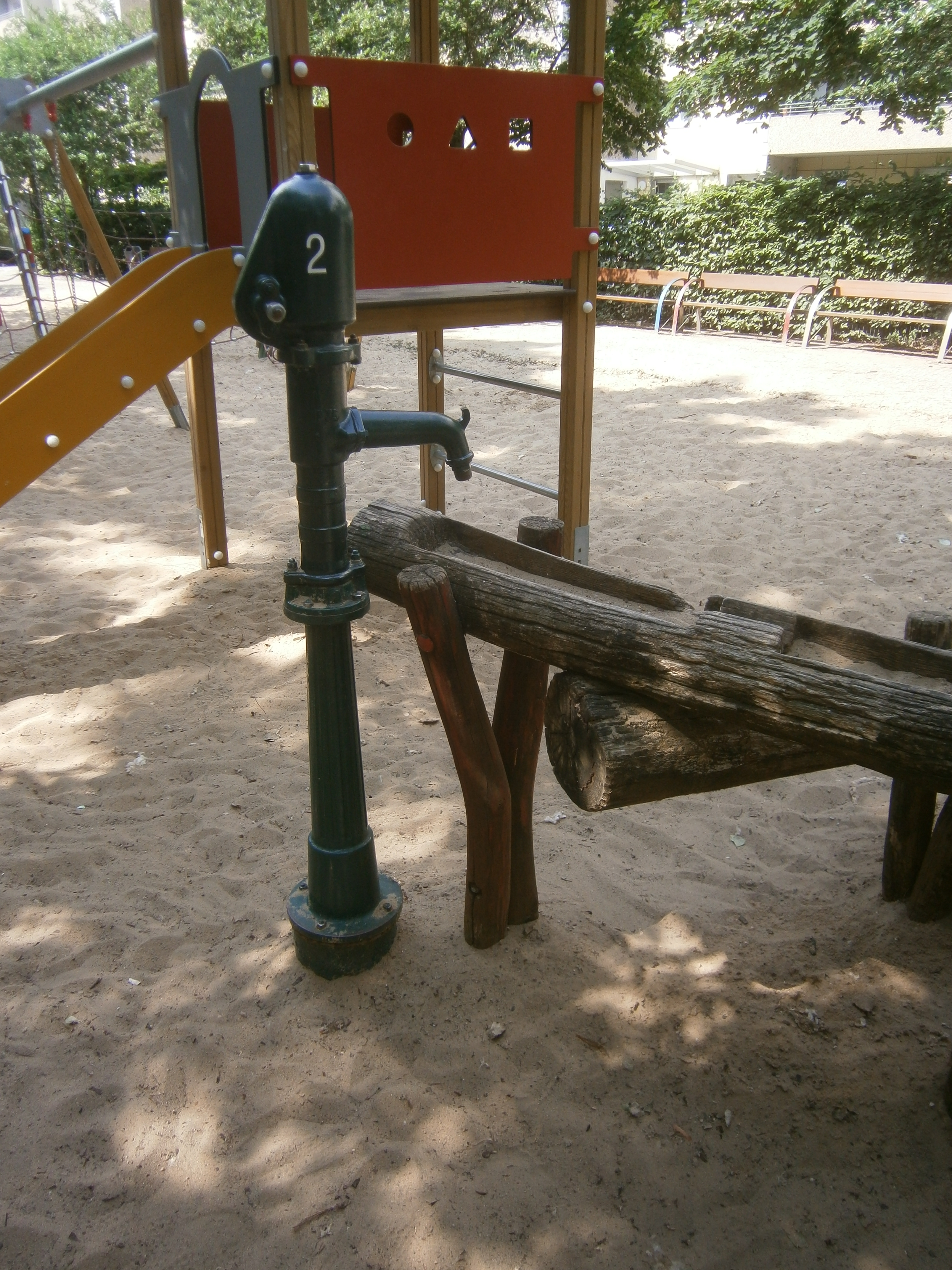 Am Platz der Vereineten Nationen im Ortsteil Friedrichshain des Berliner Nezirks Freidrichshain-Kreuzberg befinden sich hinter der Wohnhausumrandung jeweils Notwasserbrunnen. Am südöstlichen "Bumerang-Block" befindet sich dieser auf dem Spielplatz an der Hausnummer 10, an der Rückseite des Häuserblocks Strausberger Straße. Er ist als Pumpe auf dem "Matschplatz" des Spielplatzes aufgestellt.